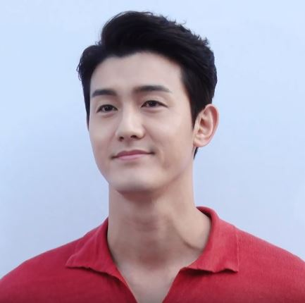 배우 하석진, 김지석, 이기우, 방송인 김충재가 4일 오후 서울 논현동의 가전매장에서 진행된 런칭기념 포토행사에 참석했다.